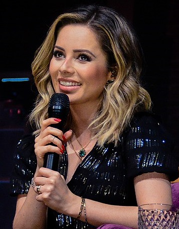 Sandy em dezembro de 2018